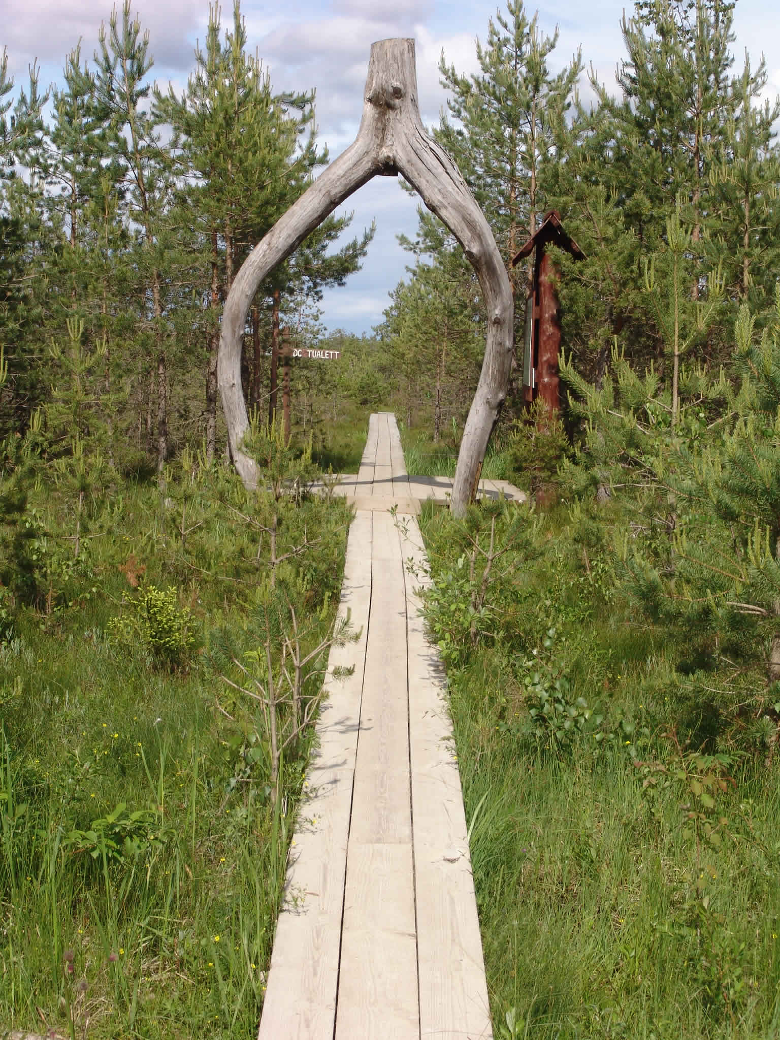 Eingang zum Soomaa Nationalpark